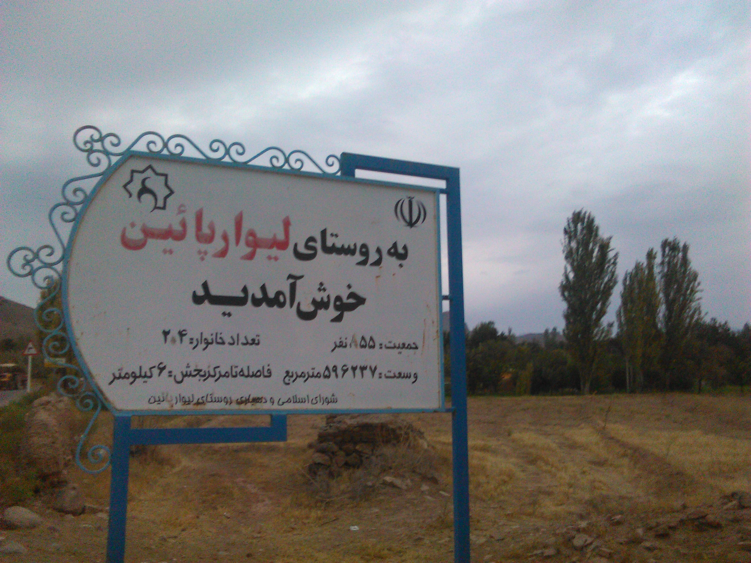 کاری از امیر رحیم زاده